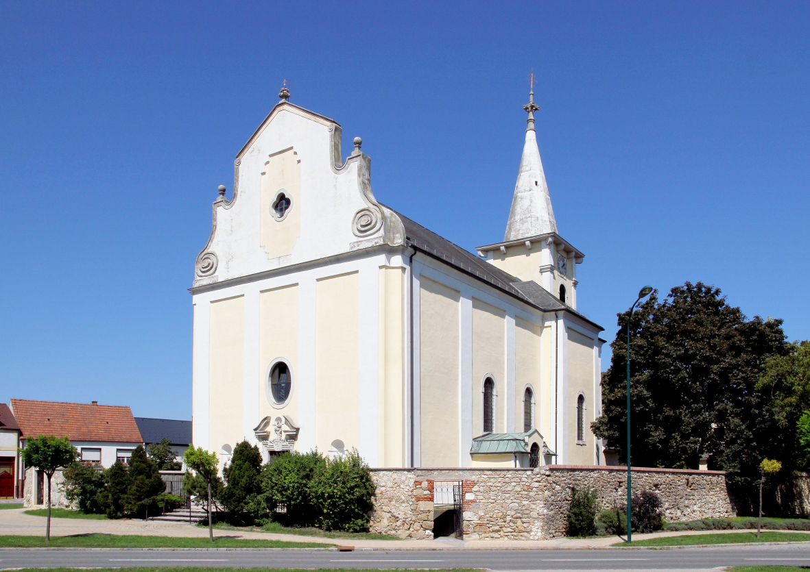 Die kath. Pfarrkirche hl. Maria Magdalena in der burgenländischen Gemeinde Schützen am Gebirge.